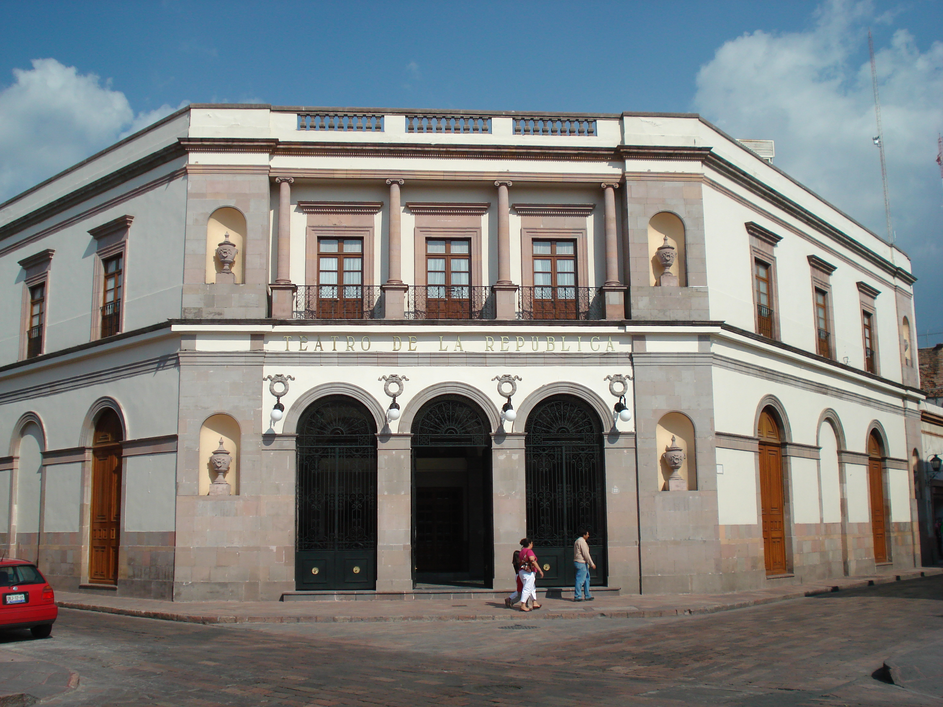 Teatro de la Republica